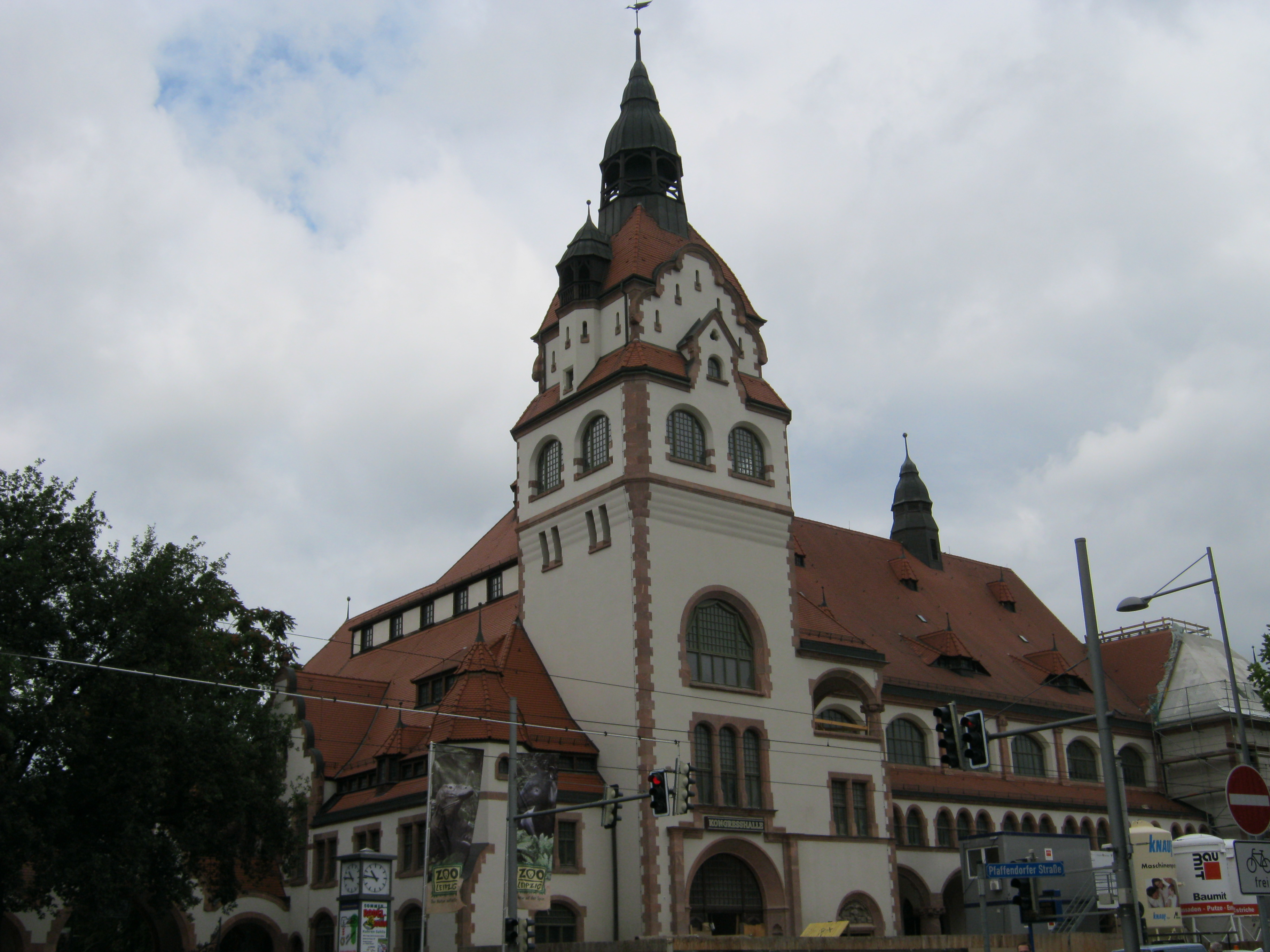 Kongresshalle Leipzig August 2011